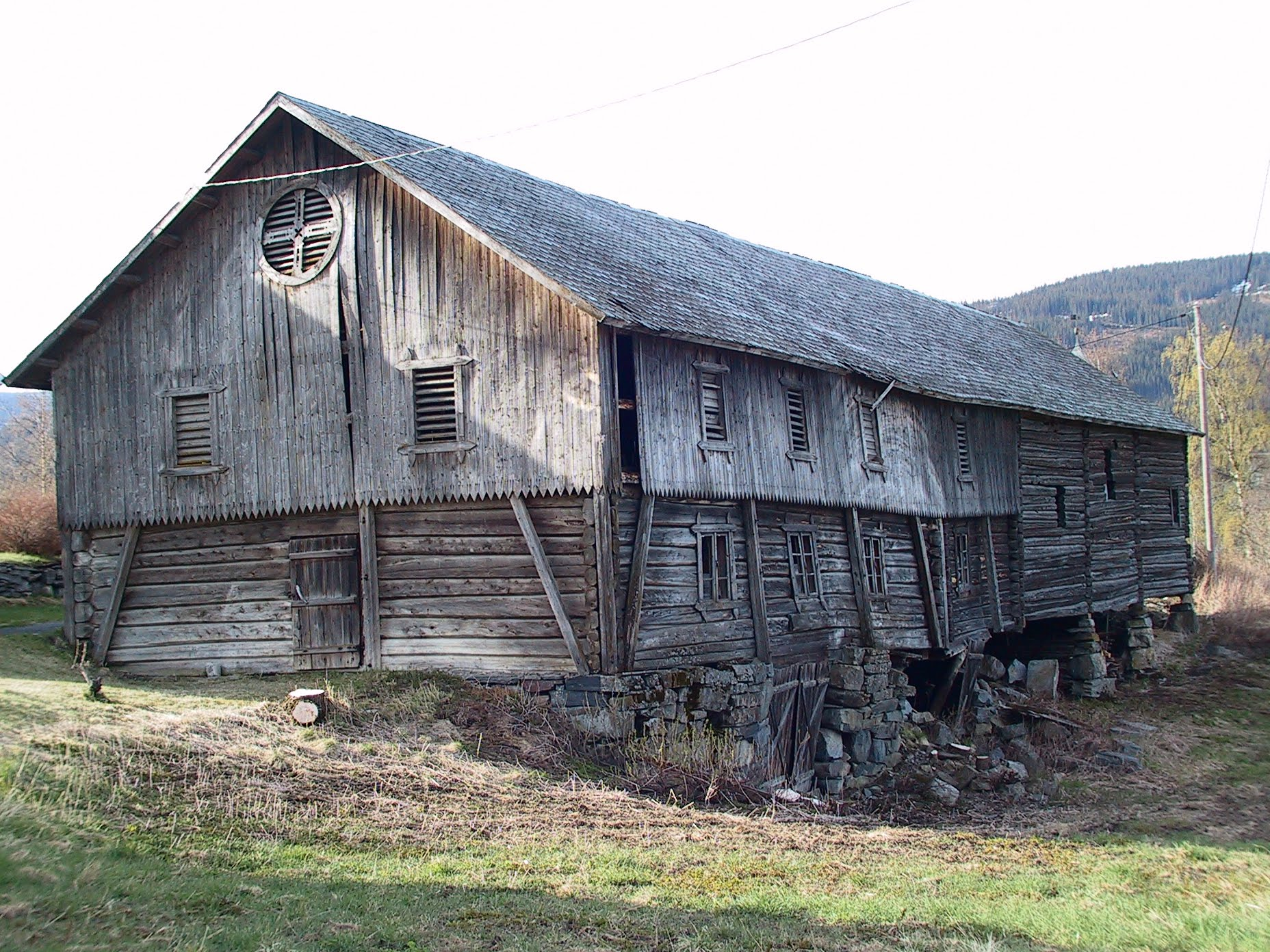 Valdresrose på låvevegg